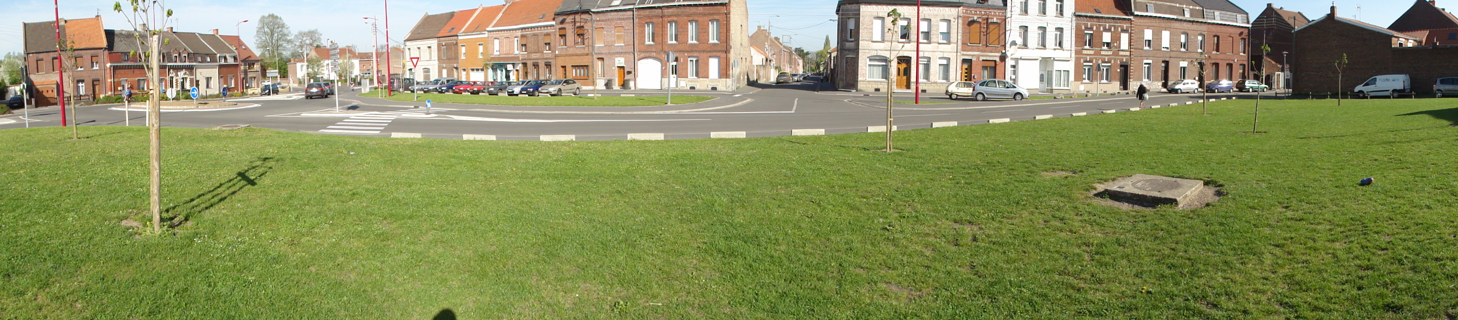 La Fosse Sainte Barbe - Saint Waast de la Compagnie des mines d'Aniche était un charbonnage constitué de deux puits situé à Aniche, Nord, Nord-Pas-de-Calais, France.